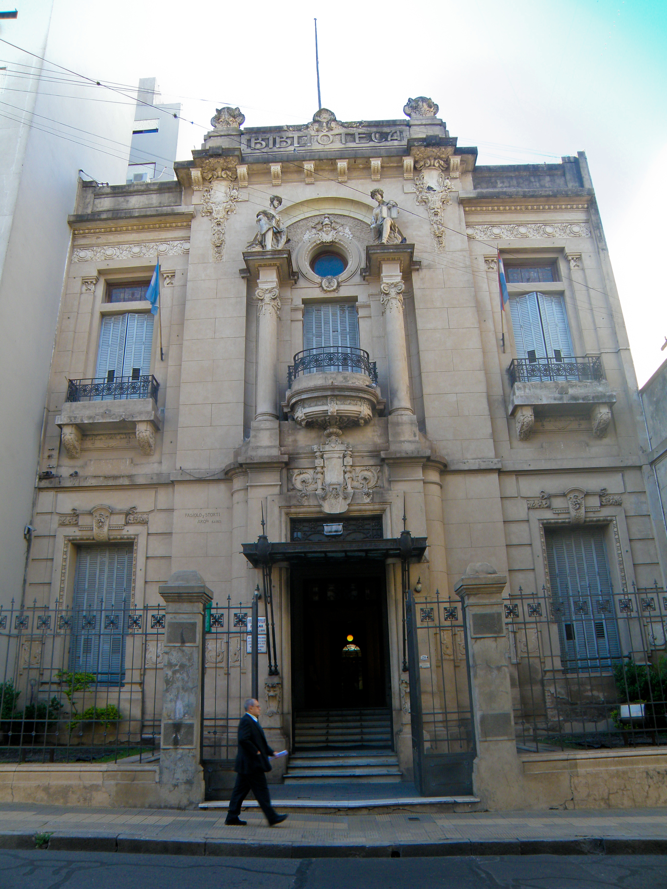 Biblioteca Popular del Paraná, institución fundada en el año 1873. Su construcción data del año 1908, su proyectista fue el arquitecto Rodolfo Fassiolo.